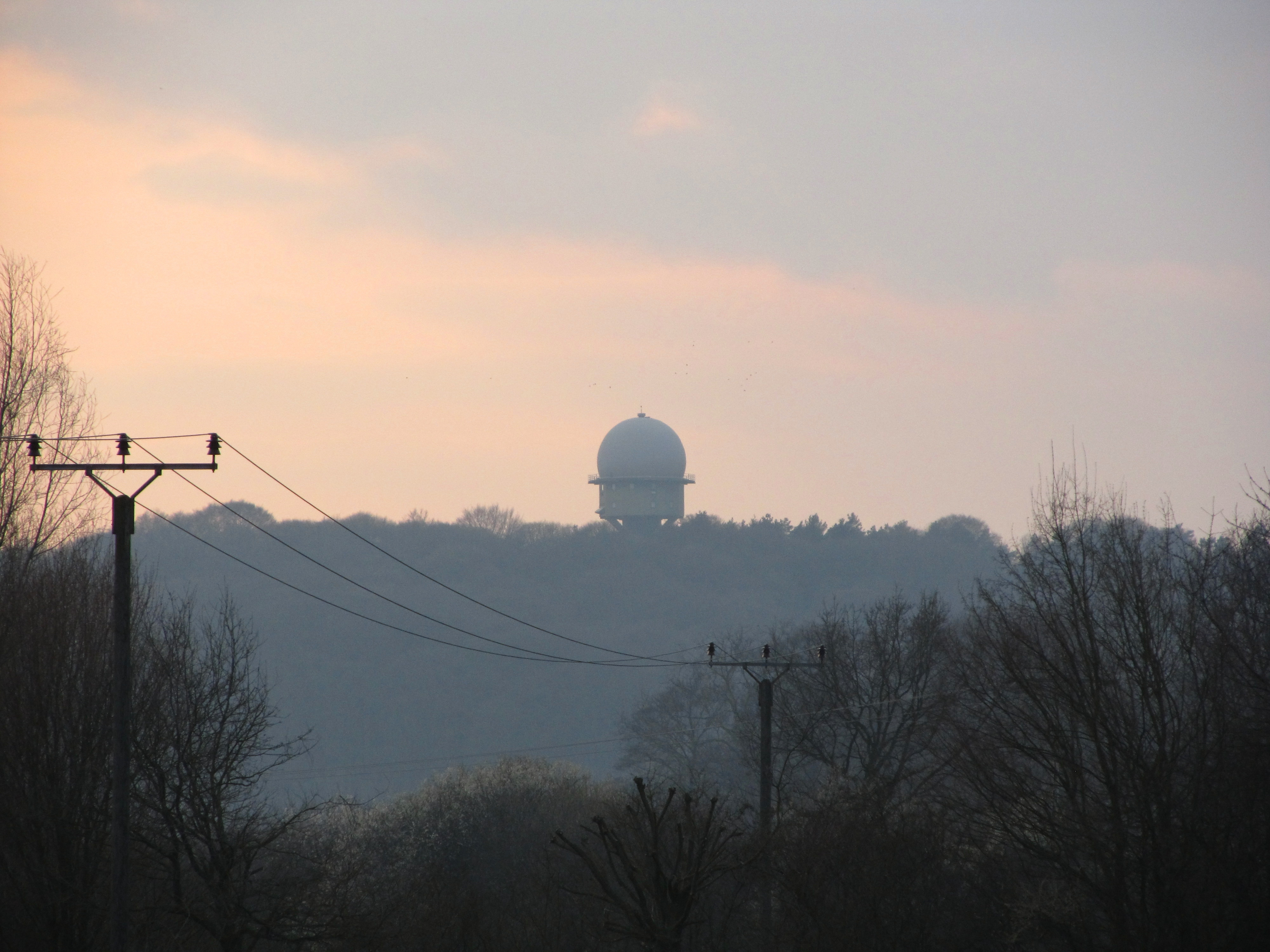 Der Einsatzführungsdienst der Luftwaffe betreibt derzeit vier Luftraumüberwachungssensoren des Typs HADR (Hughes Air Defence Radar) an den Standorten Brockzetel, Marienbaum, Erbeskopf und Meßstetten. Diese ursprünglich als Schiffsensoren konzipierten Radargeräte wurden ab 1984 in die Luftwaffe eingeführt. Die Beschaffung zweier Sensoren erfolgte durch die NATO, die übrigen wurden national finanziert. Die Radarsensoren an den Standorten Brockzetel und Erbeskopf sind mit hochmodernen Mode S-fähigen Sekundärradargeräten (MSSR 2000I) ausgestattet, mit Hilfe derer sie über die Luftfahrzeugkennung hinausgehende Informationen abfragen, auslesen und den Gefechtsständen des Einsatzführungsdienstes der Luftwaffe sowie allen über das Militärische Radardatennetz (MilRADNET) angeschlossenen Nutzern zur Verfügung stellen können. Die Sensoren vom Typ HADR haben die ursprünglich geplante Nutzungsdauer von 20 Jahren erreicht. Seit 2009 werden alle vier HADR einem umfangreichen Update-Programm unterzogen, das zu einer Laufzeitverlängerung und Leistungssteigerung der Sensoren beitragen wird. Als HADR wird das in der NATO eingesetzte Radargerät HR-3000 der Firma Hughes benannt. Hierbei handelt es ist ein 3D-Radar für die Nutzung in einem Luftverteidigungsnetzwerk - ein Radargerät, welches neben der Entfernung und dem Seitenwinkel (Standard 2D) auch die Höhe messen kann. Die Station im Marienbaumer Hochwald (Uedemer Hochwald im Gemeindegebiet von Uedem) hat eine Umkreisabdeckung von etwa 450 Km. Das Foto habe ich am 25.03.2011 vom Düsterfeld (Xanten-Marienbaum, Vordergrund) aus gemacht.